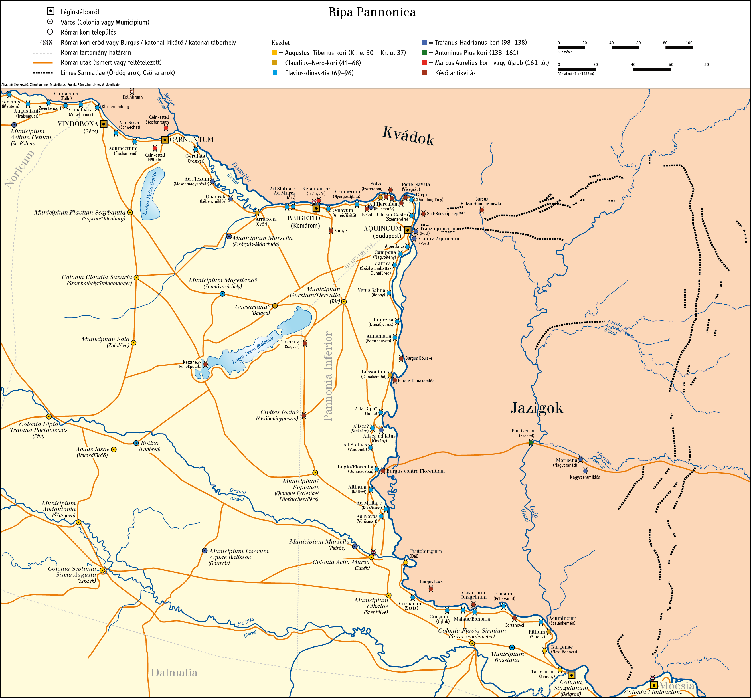 Italienischer Version der zuerst in deutsch für das „Projekt Römischer Limes“ erschienenen Karte File:Limes4.png.